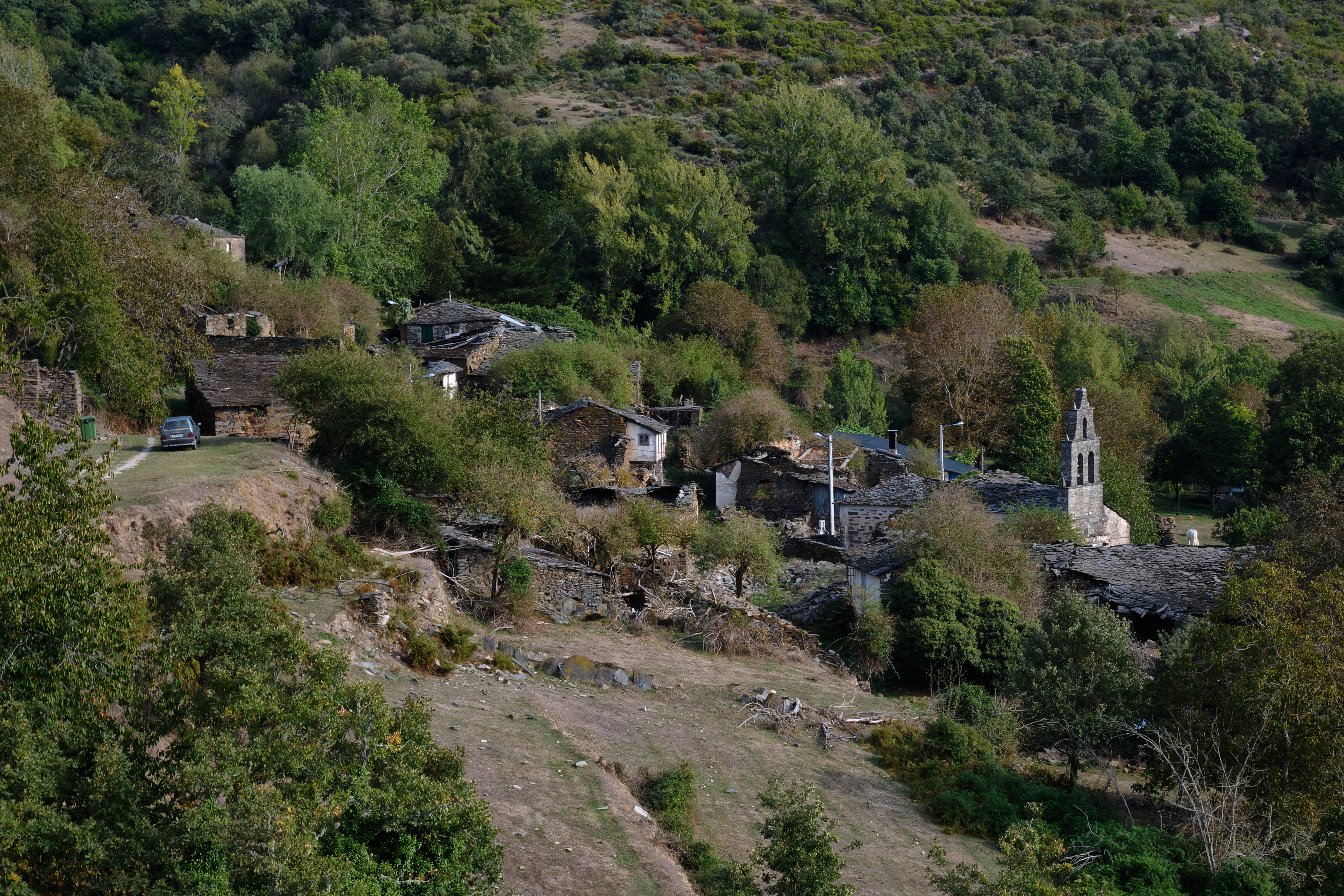 Panorámica de Santoalla do Monte